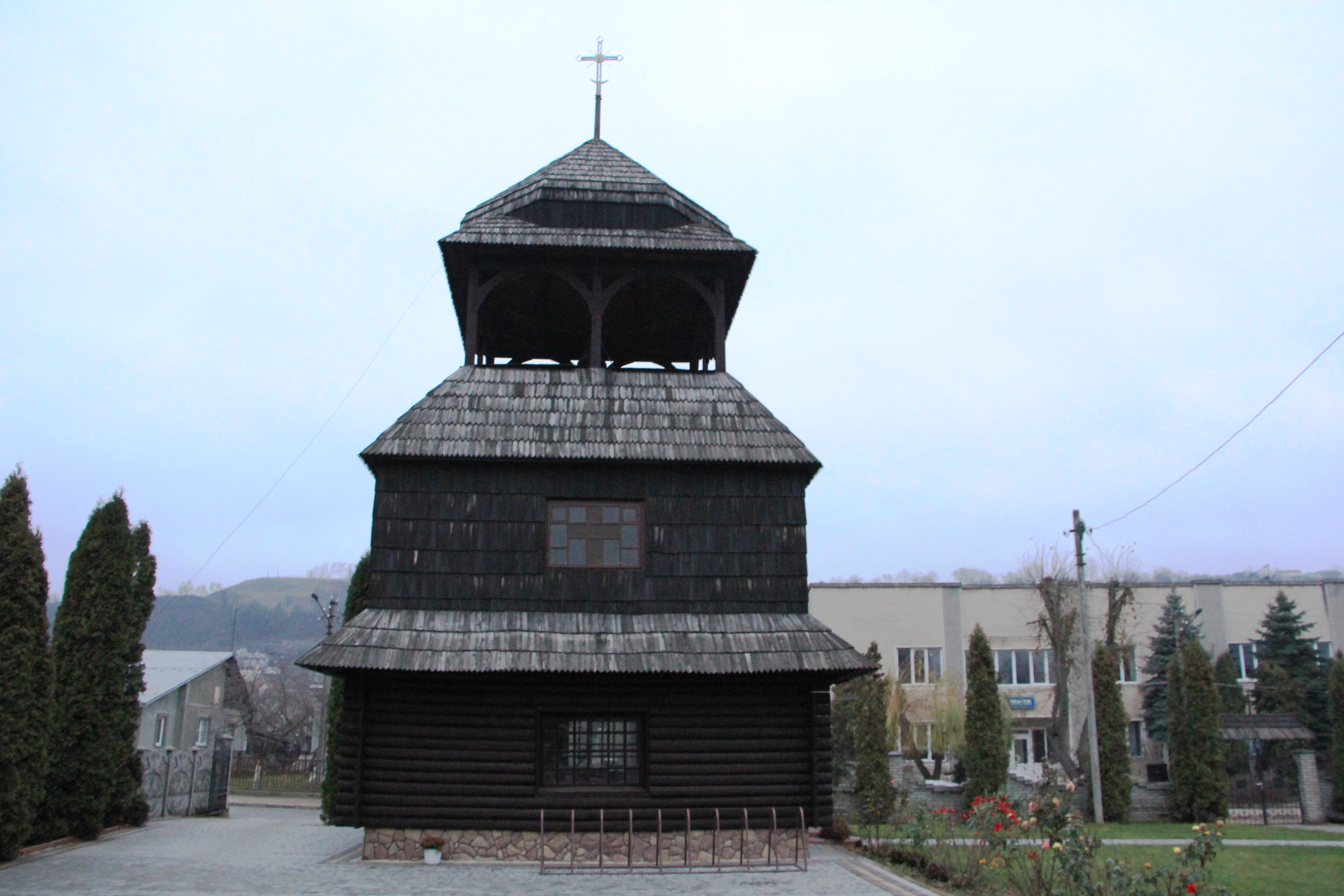 Дзвіниця церкви Вознесіння Господнього 1630